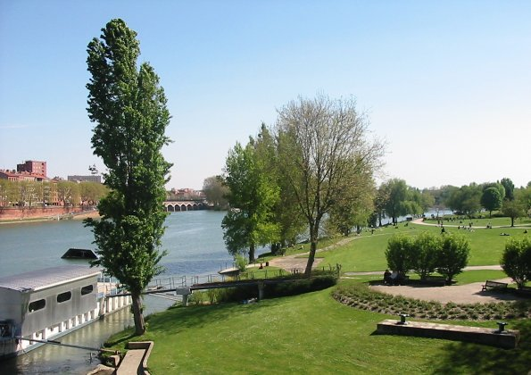 Prairie des Filtres à Toulouse.